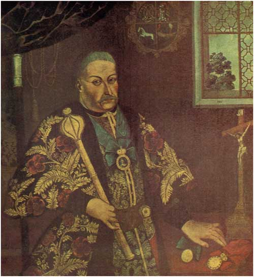 Портрет войскового атамана Д.Е. Ефремова. Фрагмент. Неизвестный художник XVIII века. Около 1752 года. Холст, масло. 210X126 см. Новочеркасский музей истории донского казачества. Находился в галерее войсковых атаманов Ефремовского дворца, Старочеркасском женском Ефремовском монастыре, Музее им. Степана Разина. Данила Ефремович Ефремов (1690-1761 года) — войсковой атаман Войска Донского (1738-1752 года). Храбрый полководец, участник Северной войны. Отличился под Калишем в битве со шведами — с небольшим отрядом казаков захватил резиденцию Карла XII в Польше. Дипломат, повлиявший на возвращение калмыков в пределы России. Был пожалован чином генерал-майора. За участие в Семилетней войне получил звание тайного советника. Изображен с наградами: золотой медалью и миниатюрным портретом Анны Иоанновны, оправленным драгоценными камнями, финифтевым портретом Елизаветы Петровны, оправленным бриллиантами, шашкой с золоченым эфесом, пожалованной императрицей Анной Иоанновной (ныне хранится в собрании Государственного Эрмитажа).